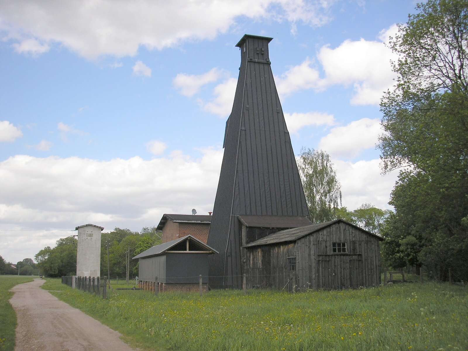 Ein Bohrturm der ehemaligen Saline in Dörnfeld an der Ilm (Ilm-Kreis, Thüringen).